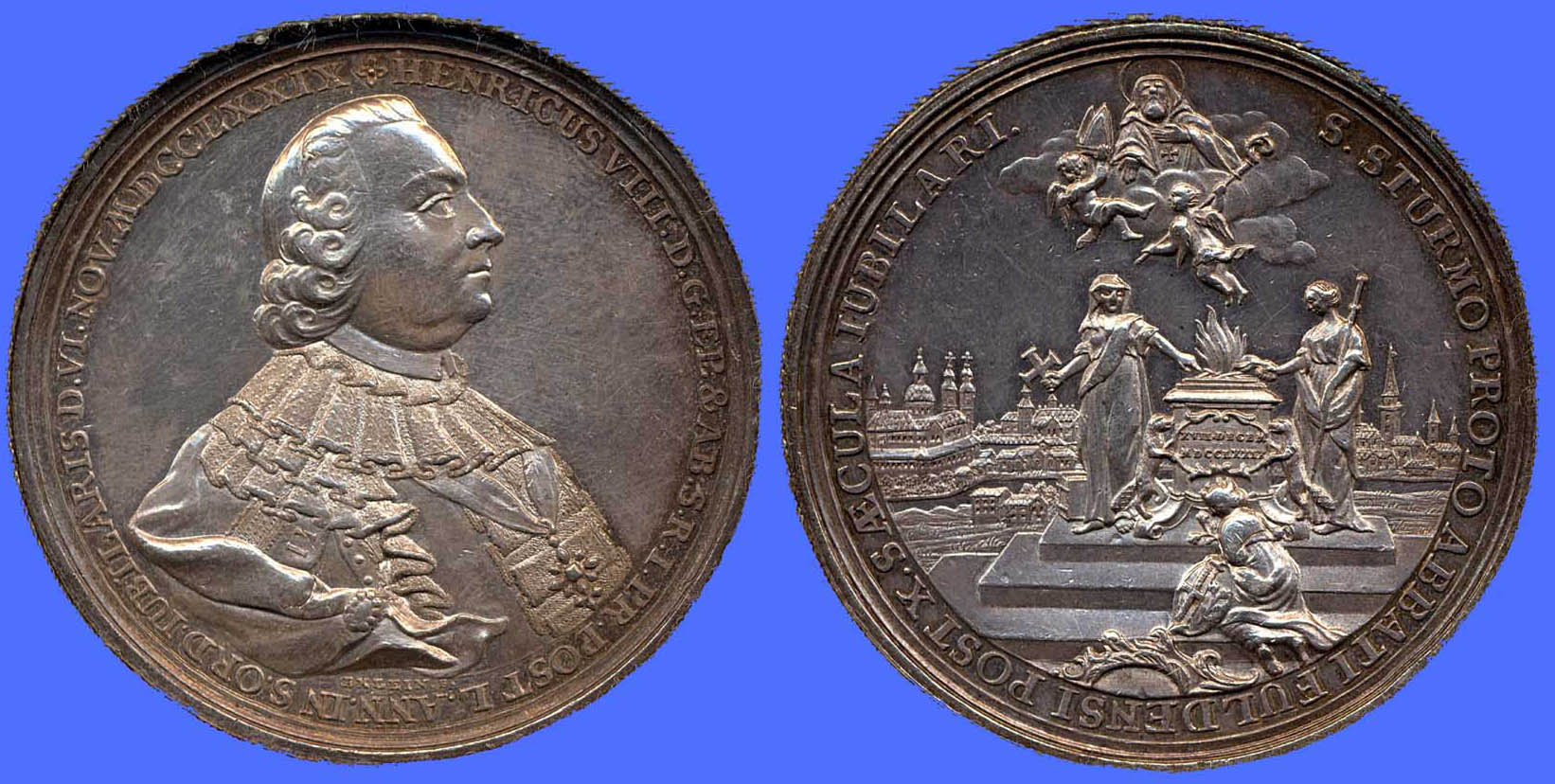 Gedenkmedaille des Fuldaer Fürstbischofs und Abtes Heinrich von Bibra aus Anlass seines 50-jährigen Ordensjubiläums (Vorderseite) und des 1000-jährigen Jubiläums des Gründerabtes Sturmius (gest. Dezember 779; Rückseite)